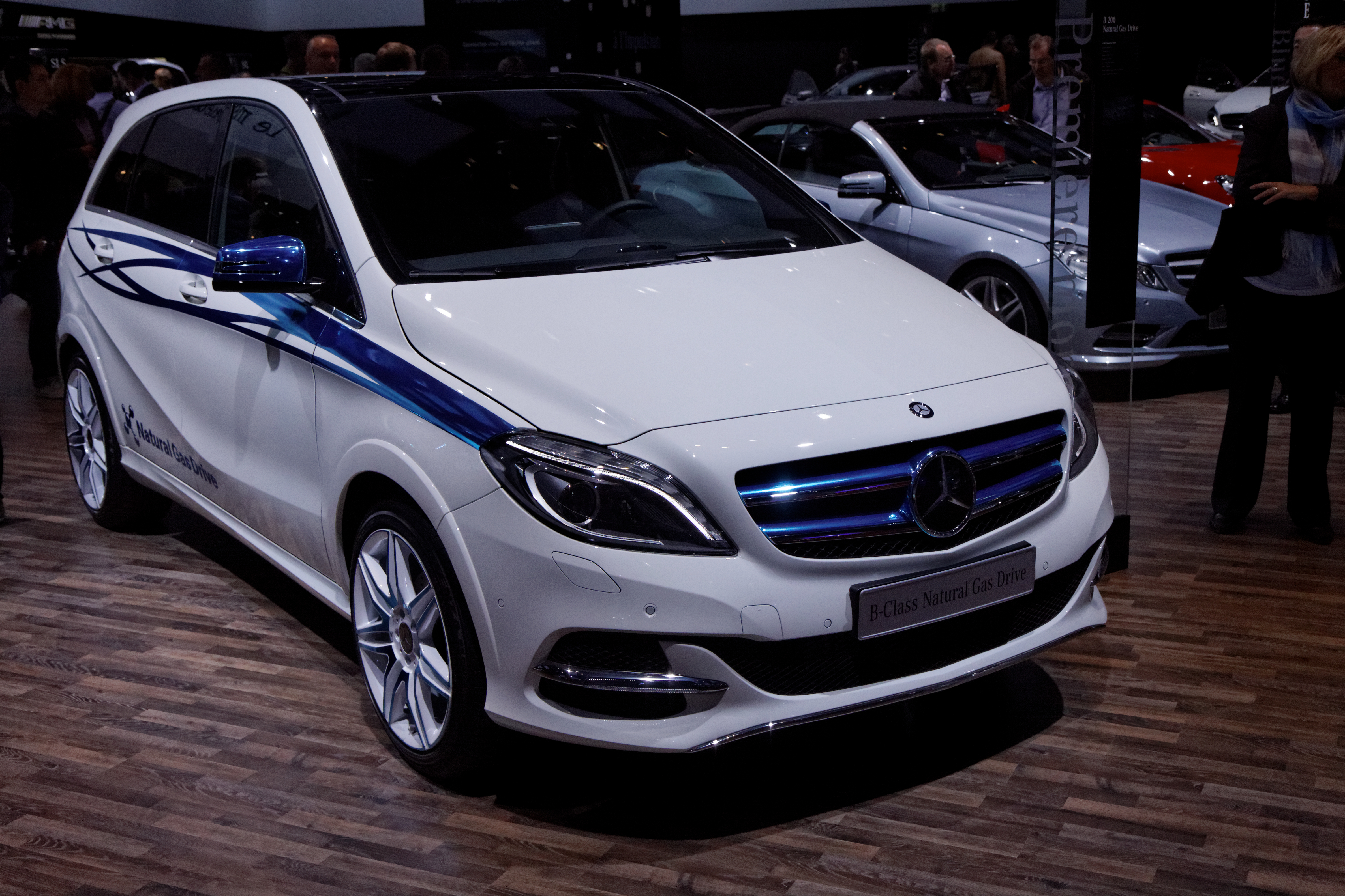 Une Mercedes Classe B gaz naturel présentée lors du Mondial de l'automobile de Paris 2012.